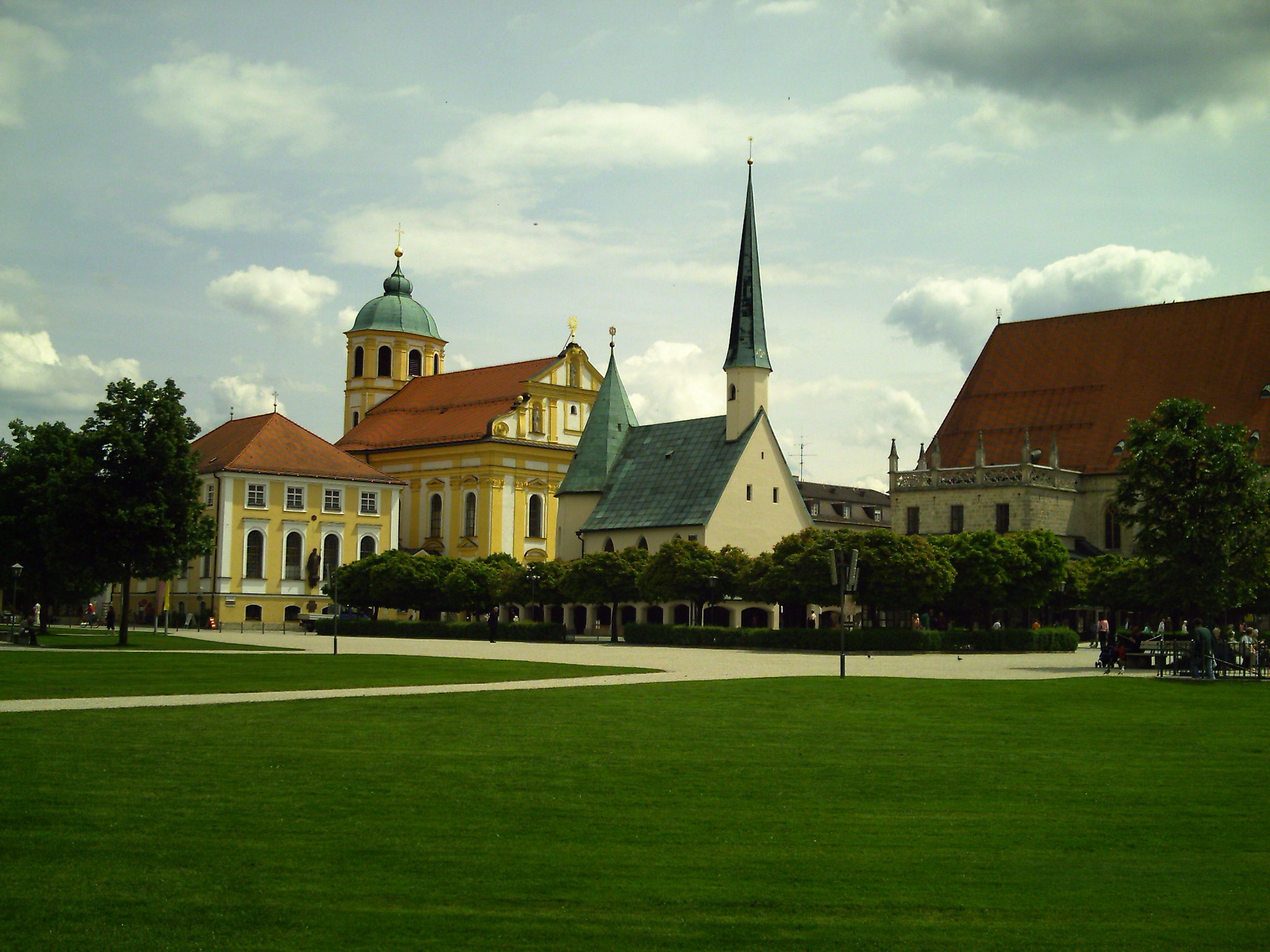 Ensemble mit Gnadekapelle in der Mitte, Altötting, Shrine of Europe, Herz Bayerns, Kapelle geweiht unserer lb. Frau (St. Maria) von Altötting, "Schwarze Madonna" mit über 1 Mio. Pilger pro Jahr.